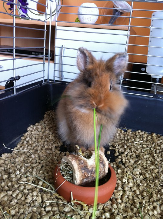 Ein junges Löwenkopfkaninchen (Weibchen) freim fressen.